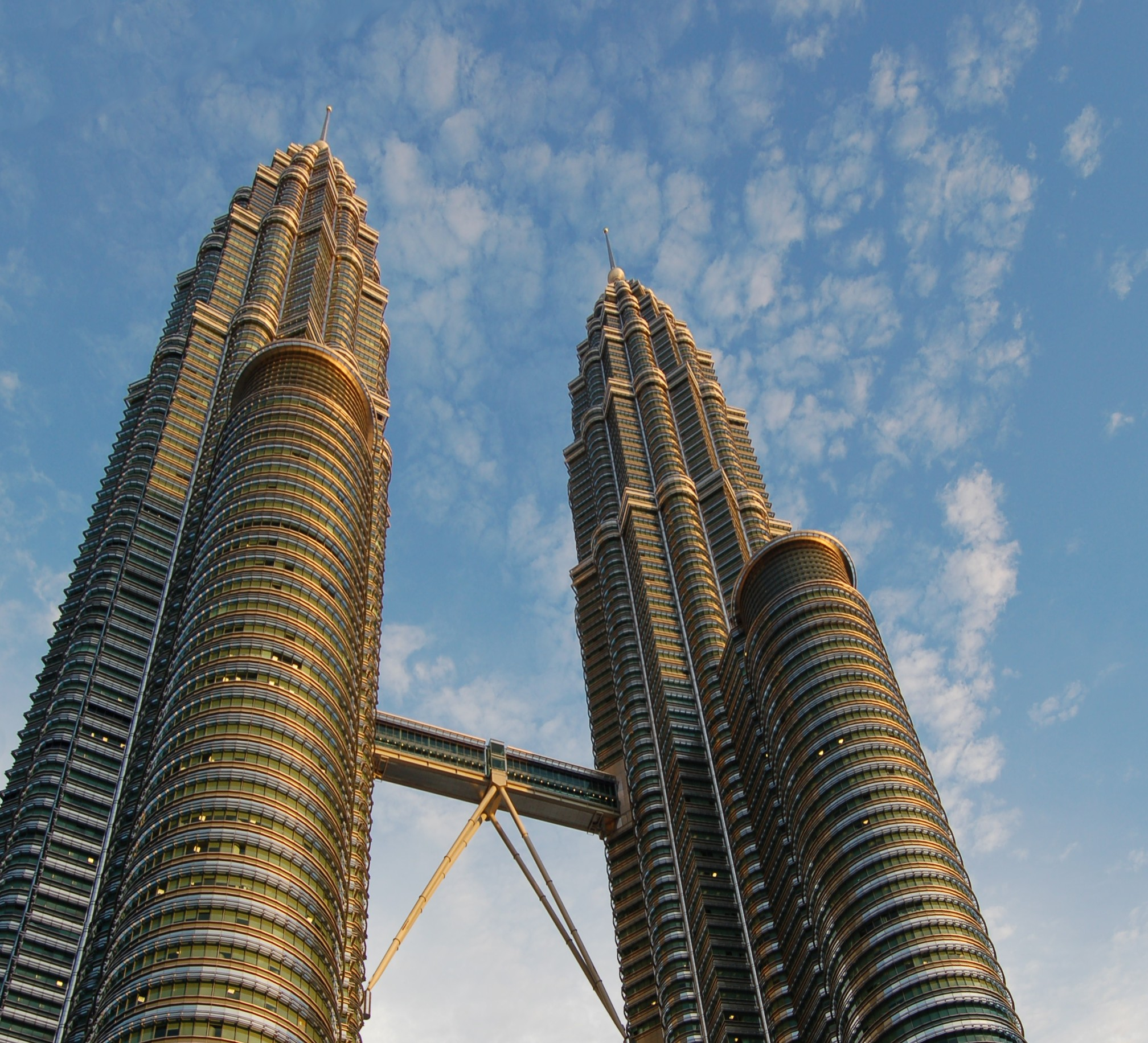 Die Petronas Twin Towers in Kuala Lumpur, Malaysia